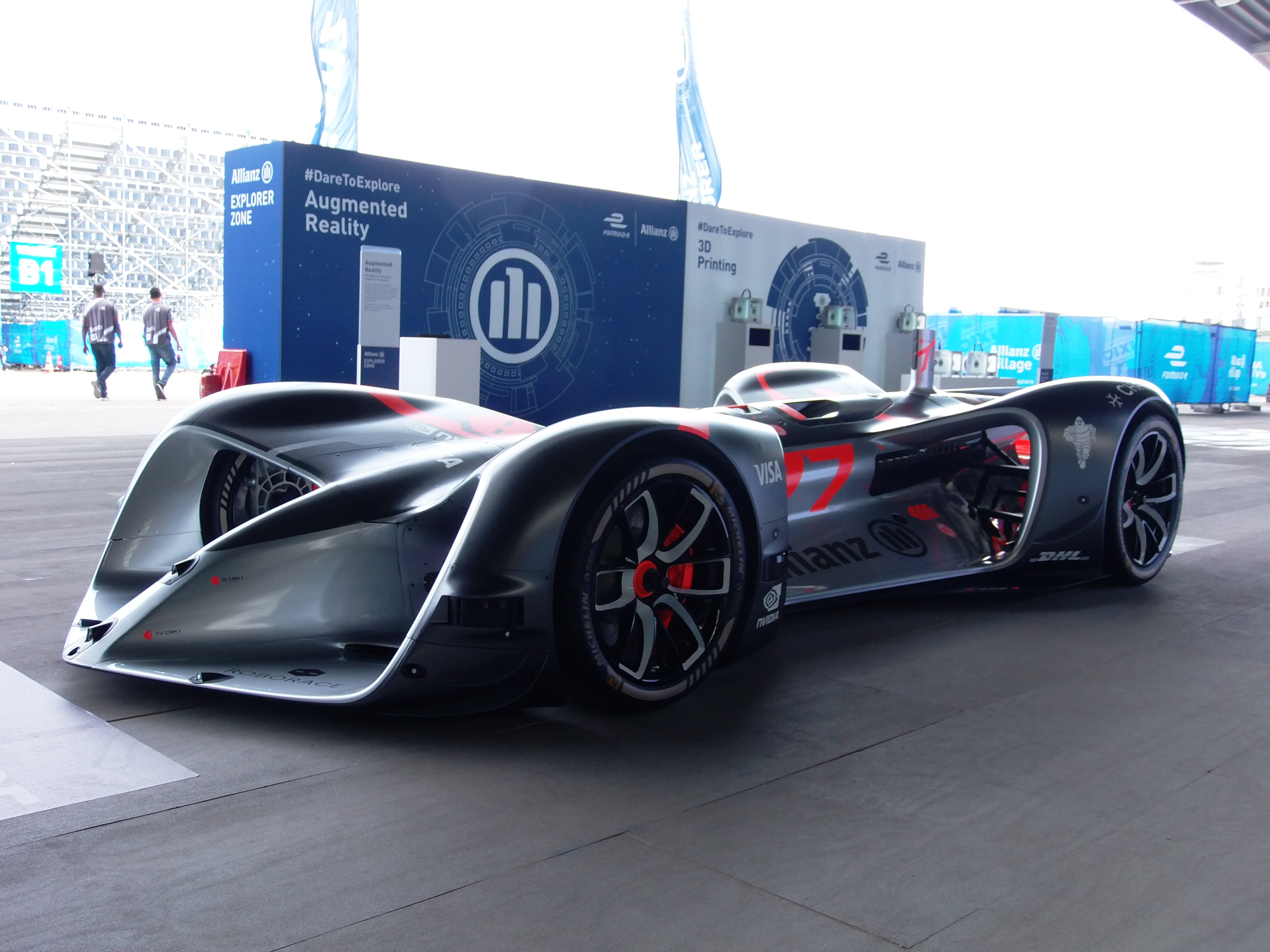 Roborace Showcar beim Berlin ePrix 2017